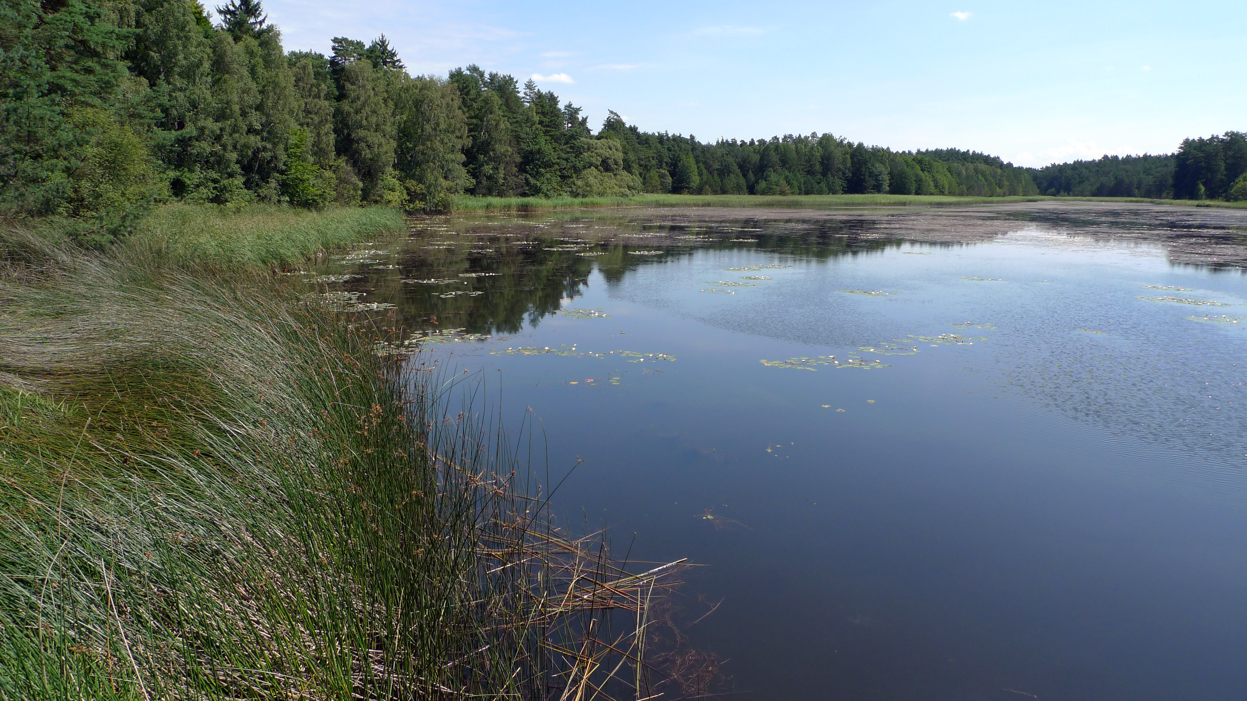 Hradčanské rybníky nedaleko Ralska v severních Čechách